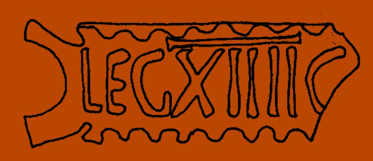 Röm. Ziegelstempel d. XIIII. Legion G., Stift Klosterneuburg, Kreuzgang Nord, 2,62-2,88 cm, 101-114 n.Chr.